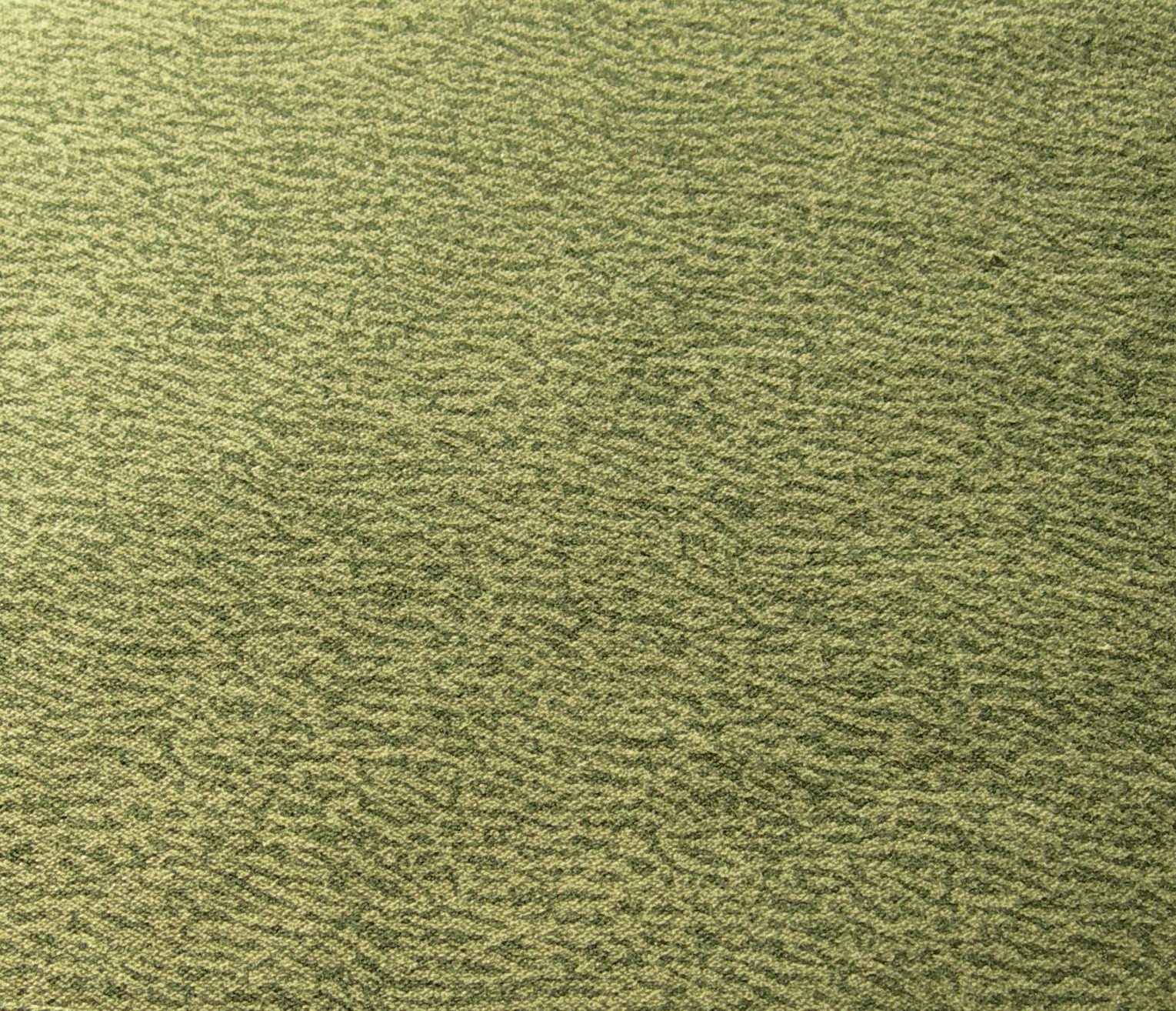 Camouflage polonais wz. 68 "Moro"